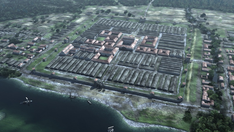 Virtuelle Idealrekonstruktion des mit bis zu 6000 Legionären besetzten Lagers.